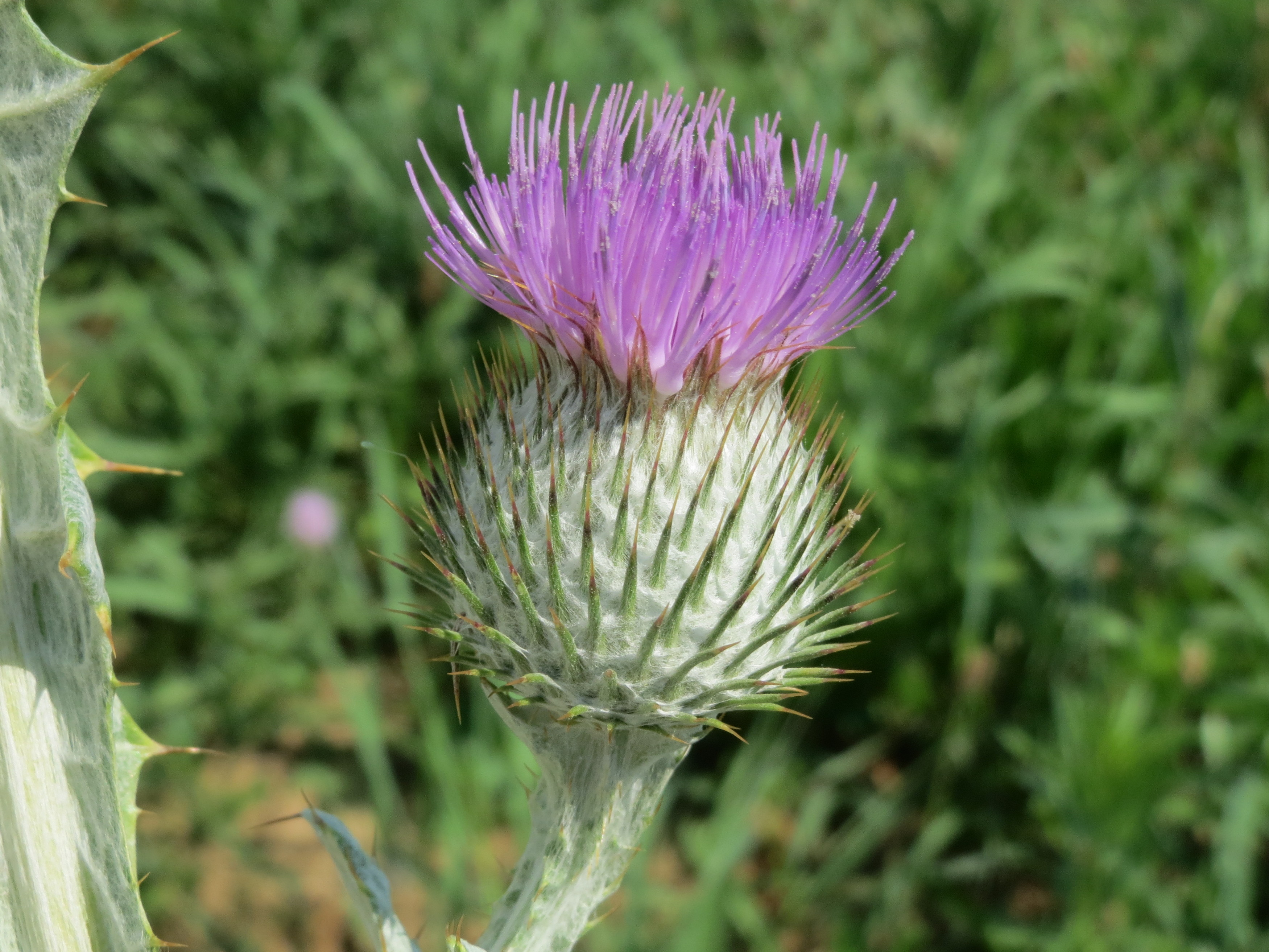 Eselsdistel (Onopordum acanthium) im Neubaugebiet "Am alten Bahnhof" in Neulußheim